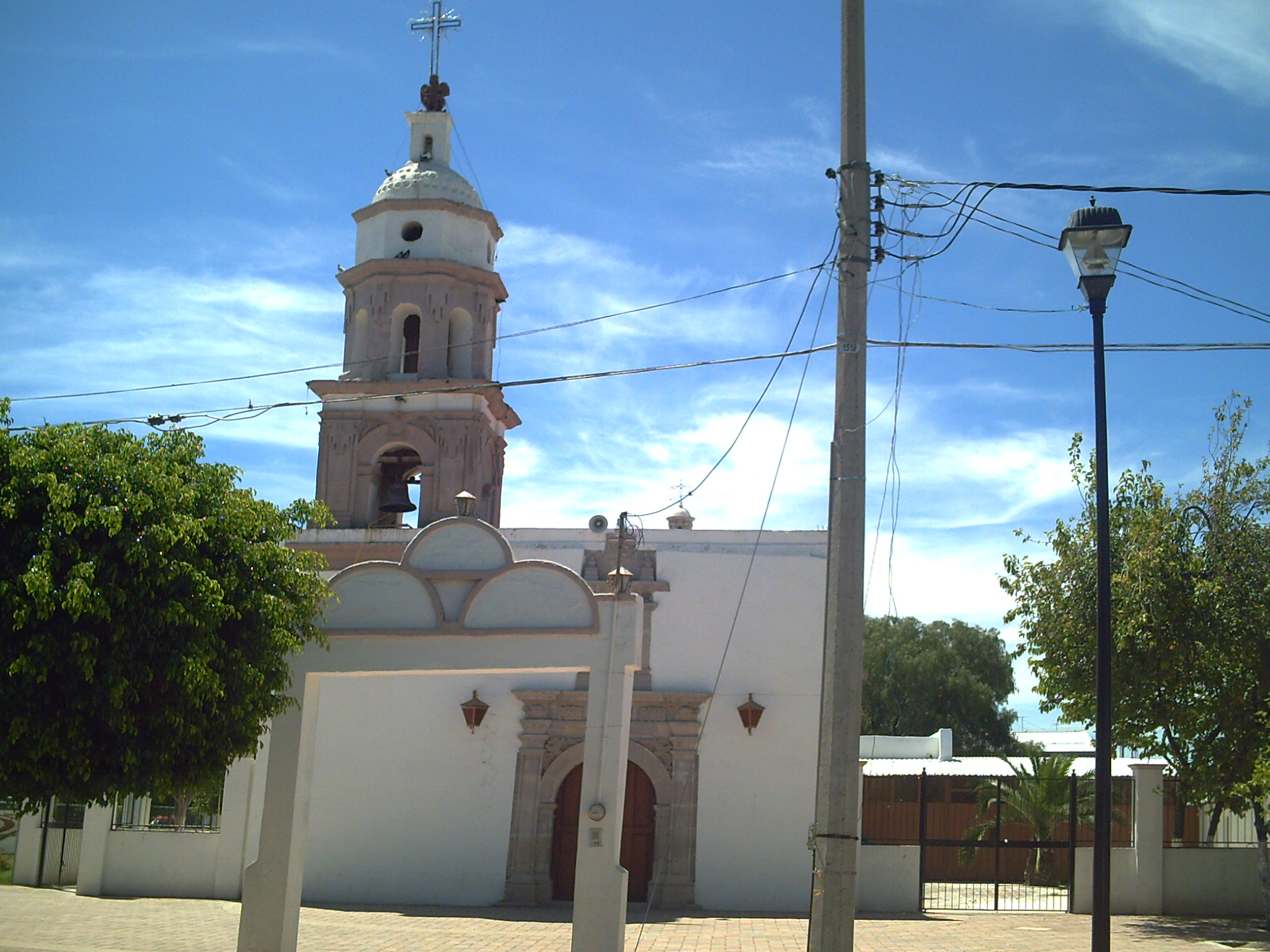 Vista frontal del templo de San Miguel en San Francisco del Rincón